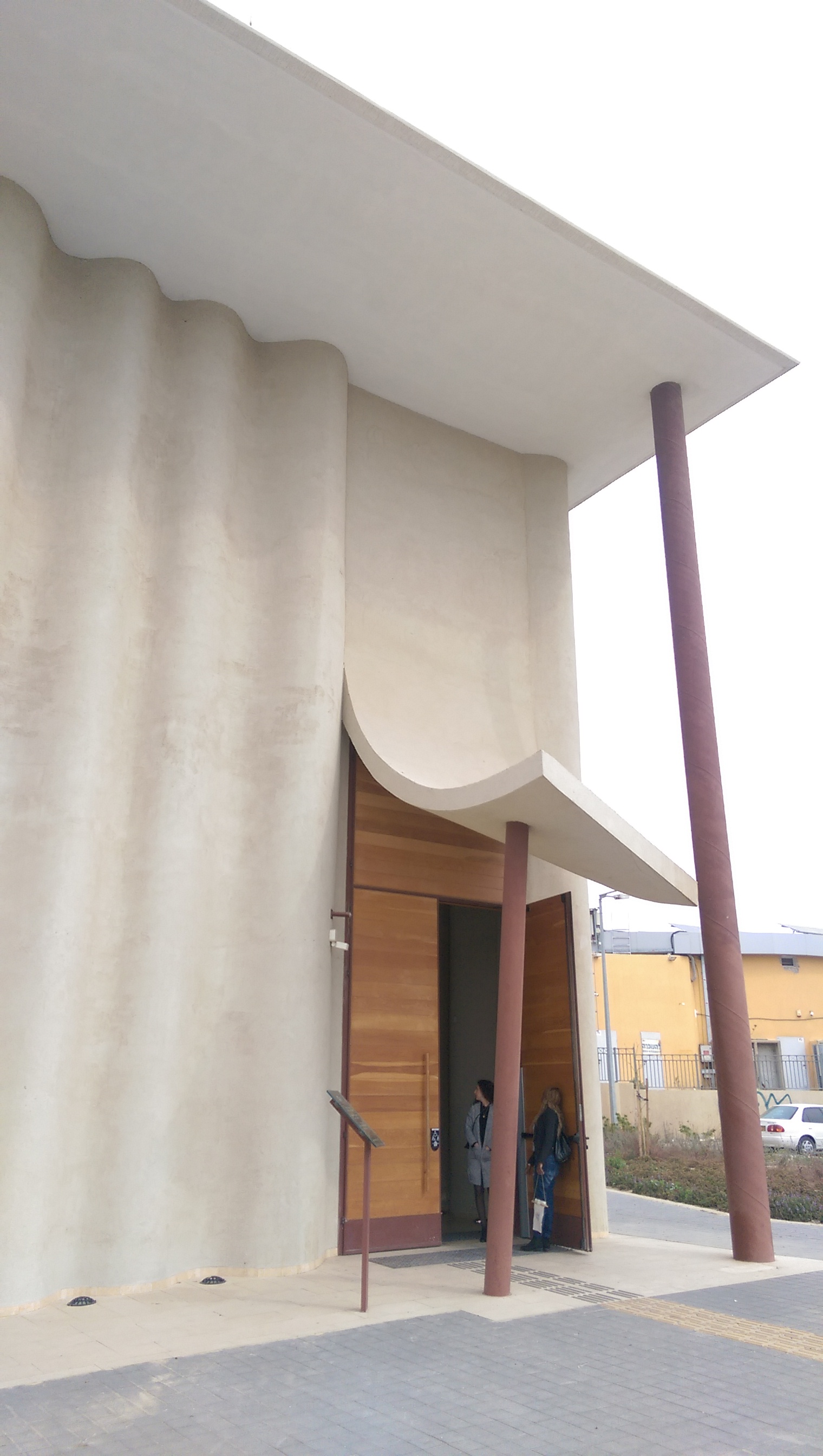 Entrance to Abraham Wells tour site, Beer Sheva כניסה לאתר התיירות באר אברהם, באר שבע